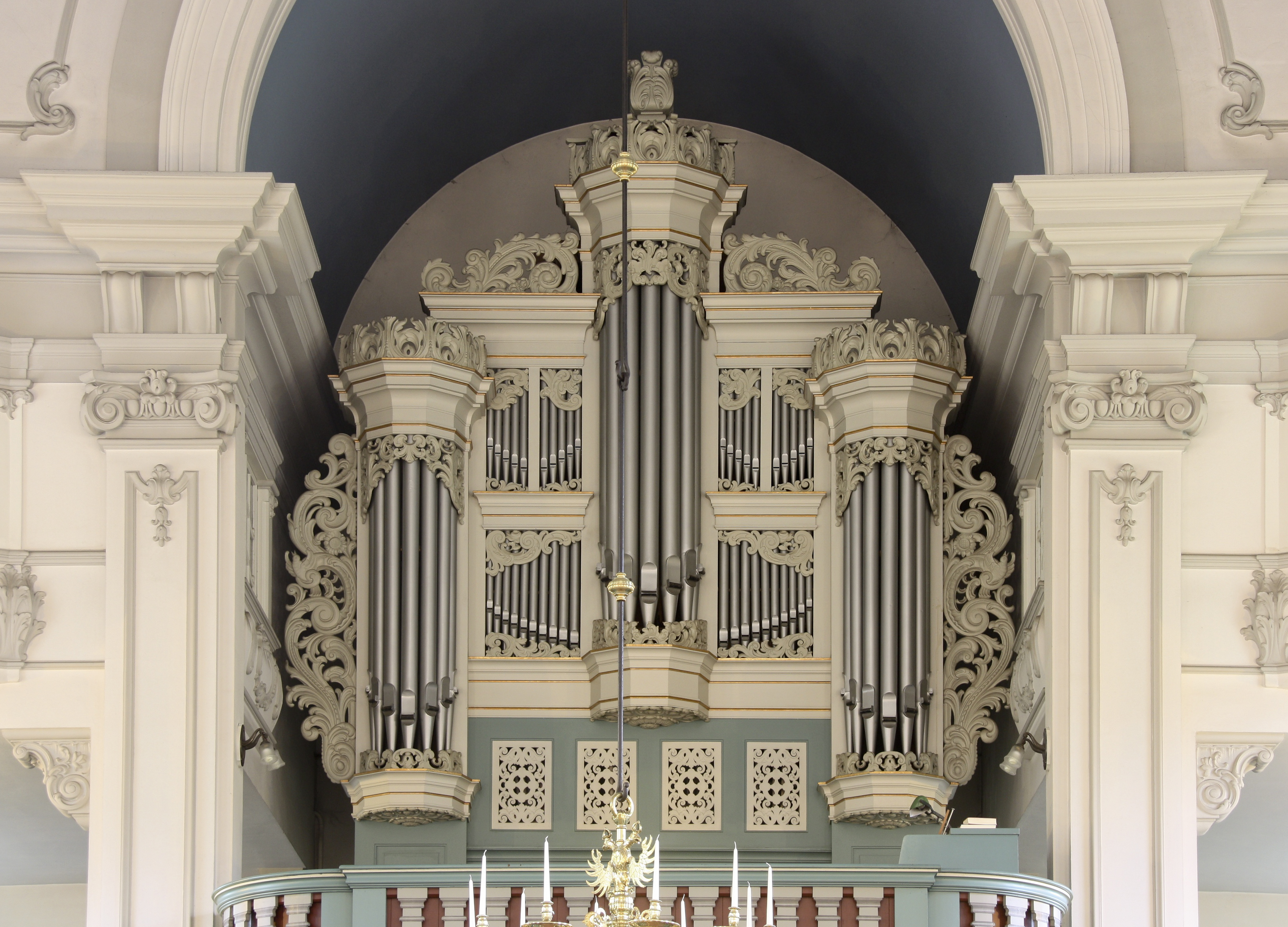 Hamburg, Billwerder, Kirche St. Nikolai, Innenraum, OrgelprospektThis is a photograph of an architectural monument.